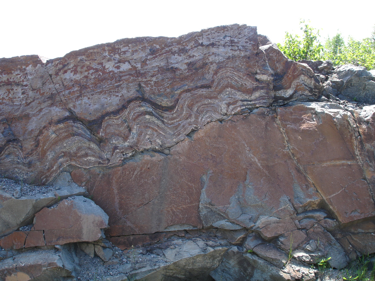 Wawa地区の縞状鉄鉱層